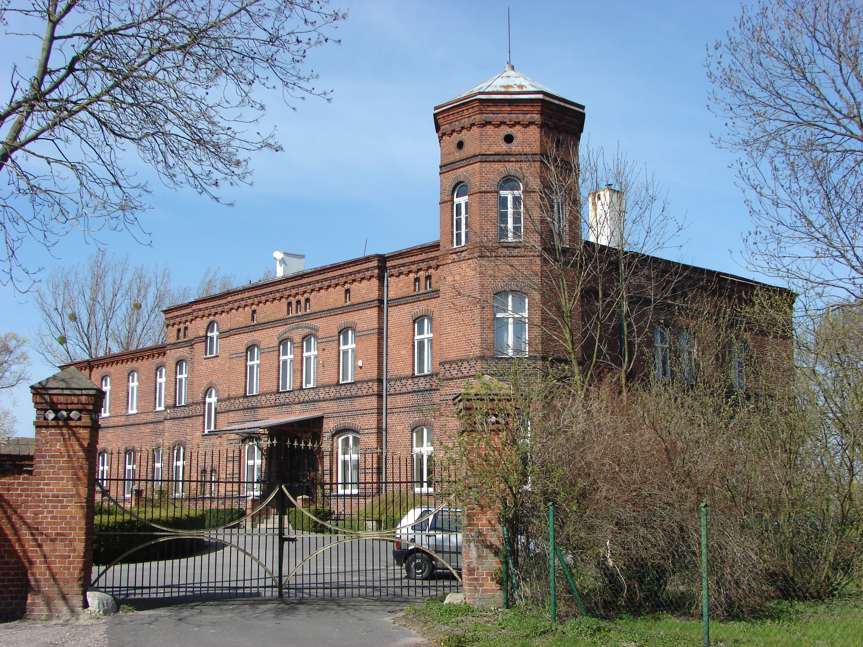 Kończewice, Gmina Chełmża. The manor house, XIX century.